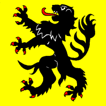 Wappen Baltschieder